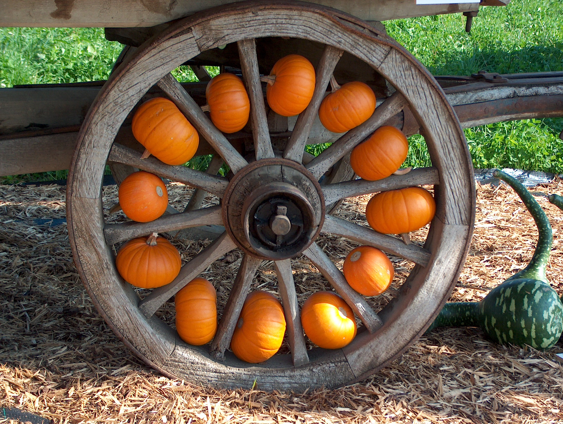 Herbstimpression, Kürbise in einem Wagenrad (Cucurbita)